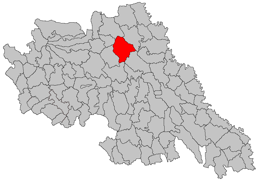 Categorie:Hărţi ale judeţului Iaşi